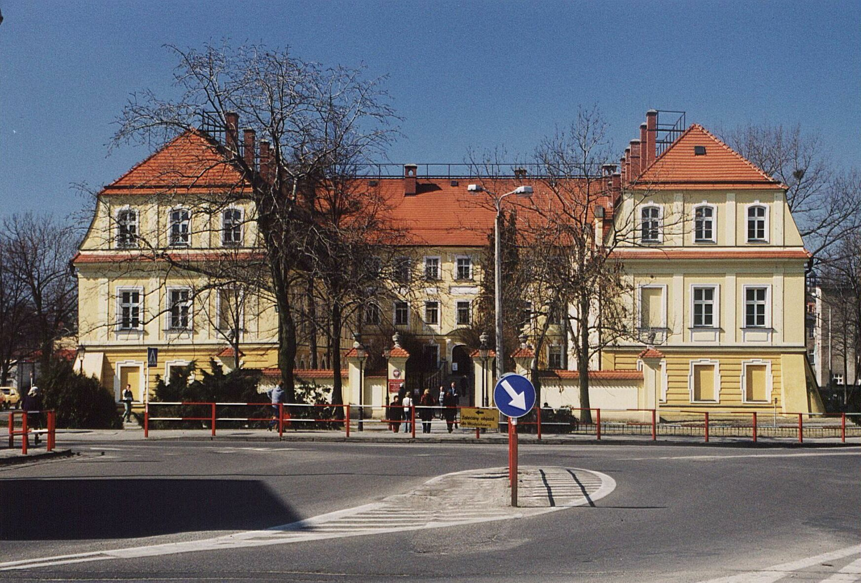 Dawny zamek (obecnie siedziba Sądu Rejonowego); Rybnik, pl.Kopernika 2 .